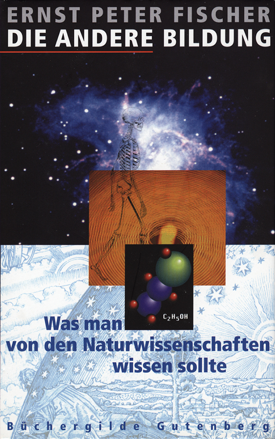 Wolfgang Lauter: Schutzumschlaggestaltung für das Sachbuch: Ernst Peter Fischer «Die Andere Bildung«, Büchergilde Gutenberg, Frankfurt 2002